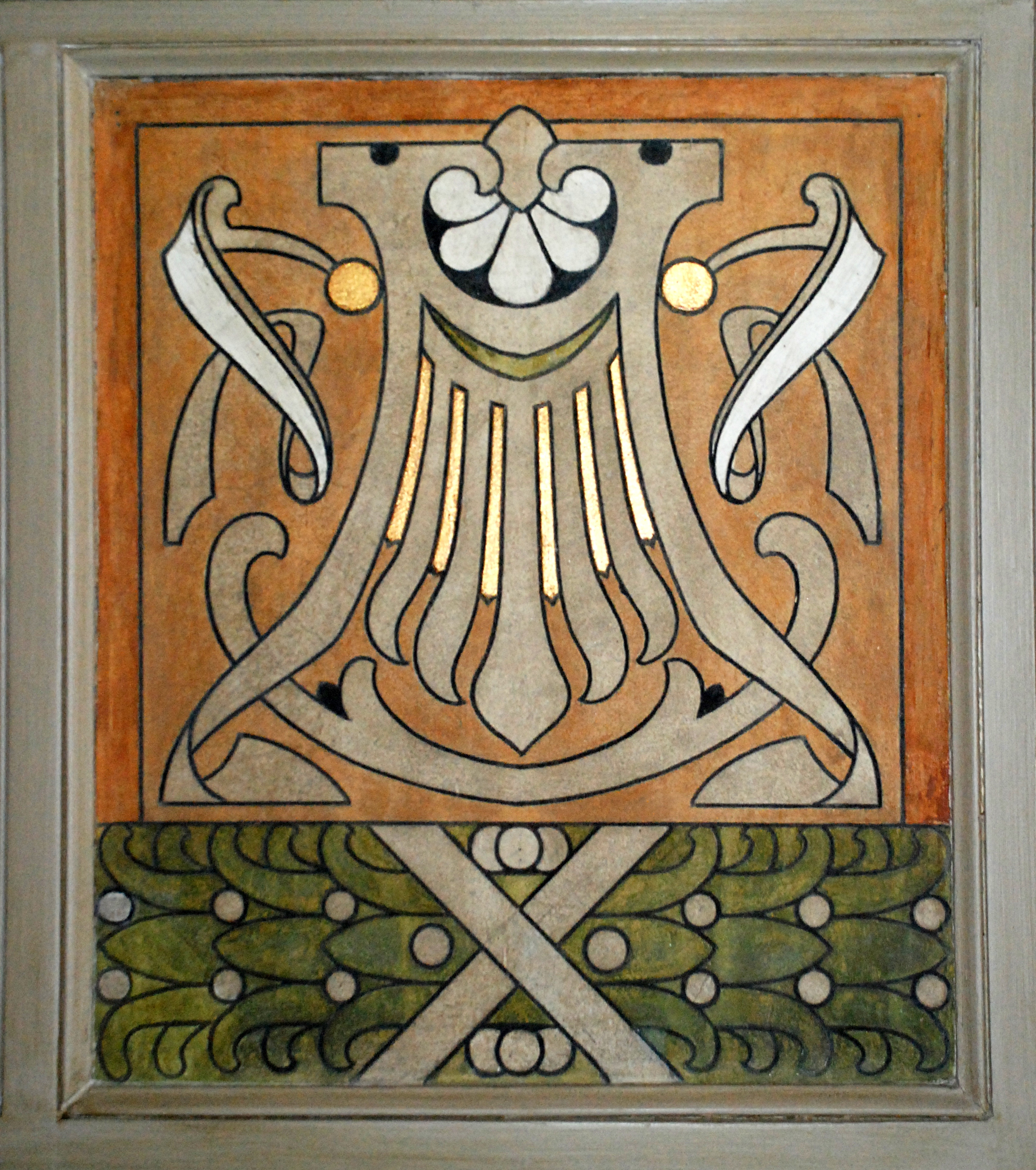 Léon Govaerts - Siège de la Gresham Life Assurance Society Limited, Place Royale à Bruxelles (Art nouveau; 1903)